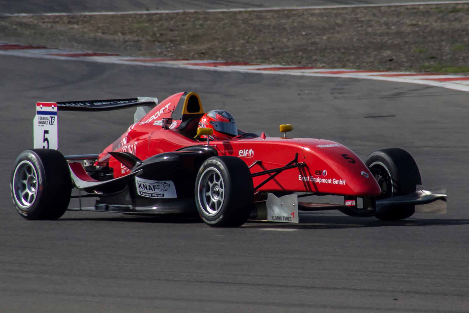 1. Lauf der Formula Renault 1.6 NEC Junior am Nürburgring 2013, Fahrer: Larry Ten Voorde